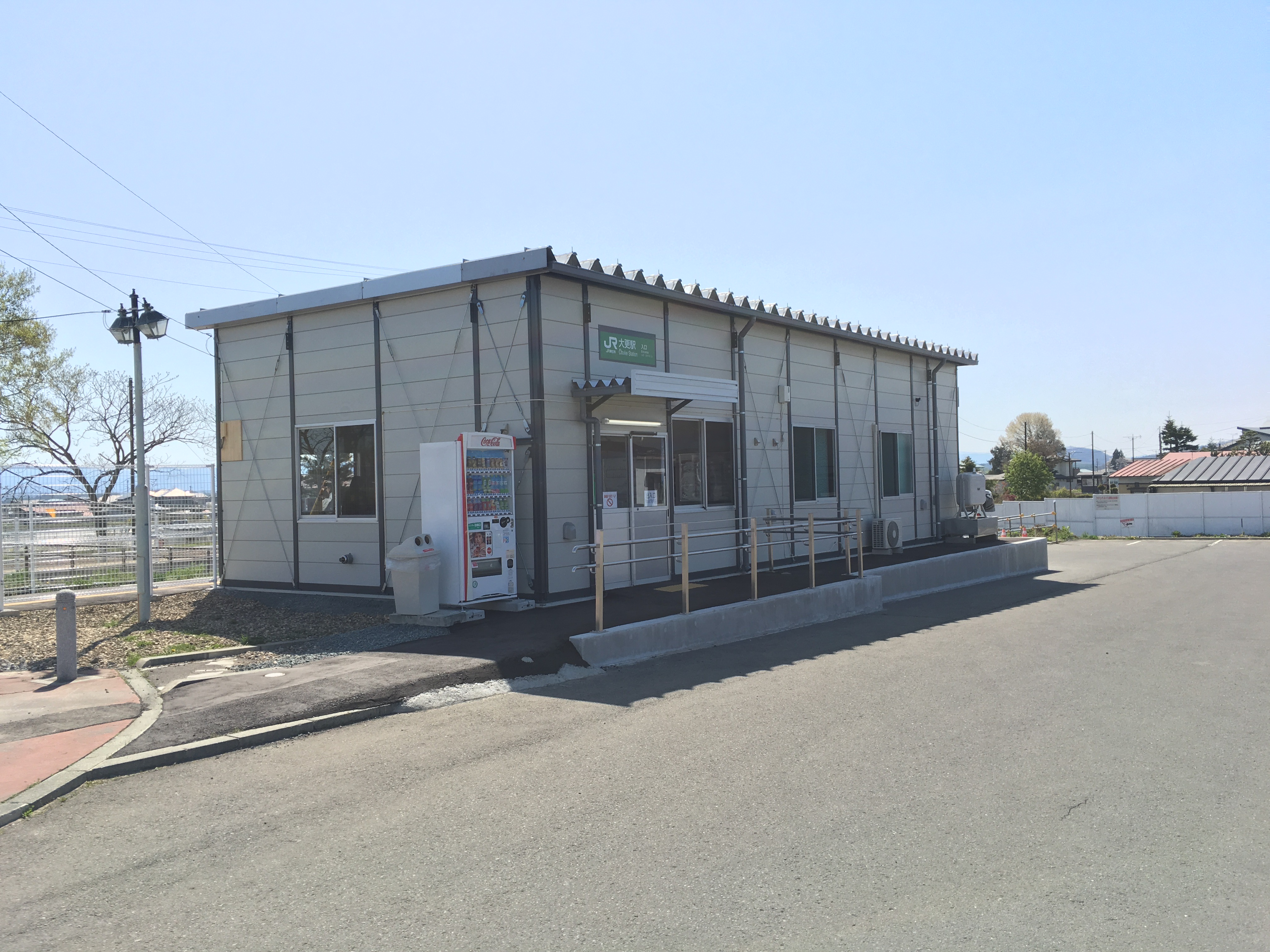 2017年5月4日，大更駅にて撮影。